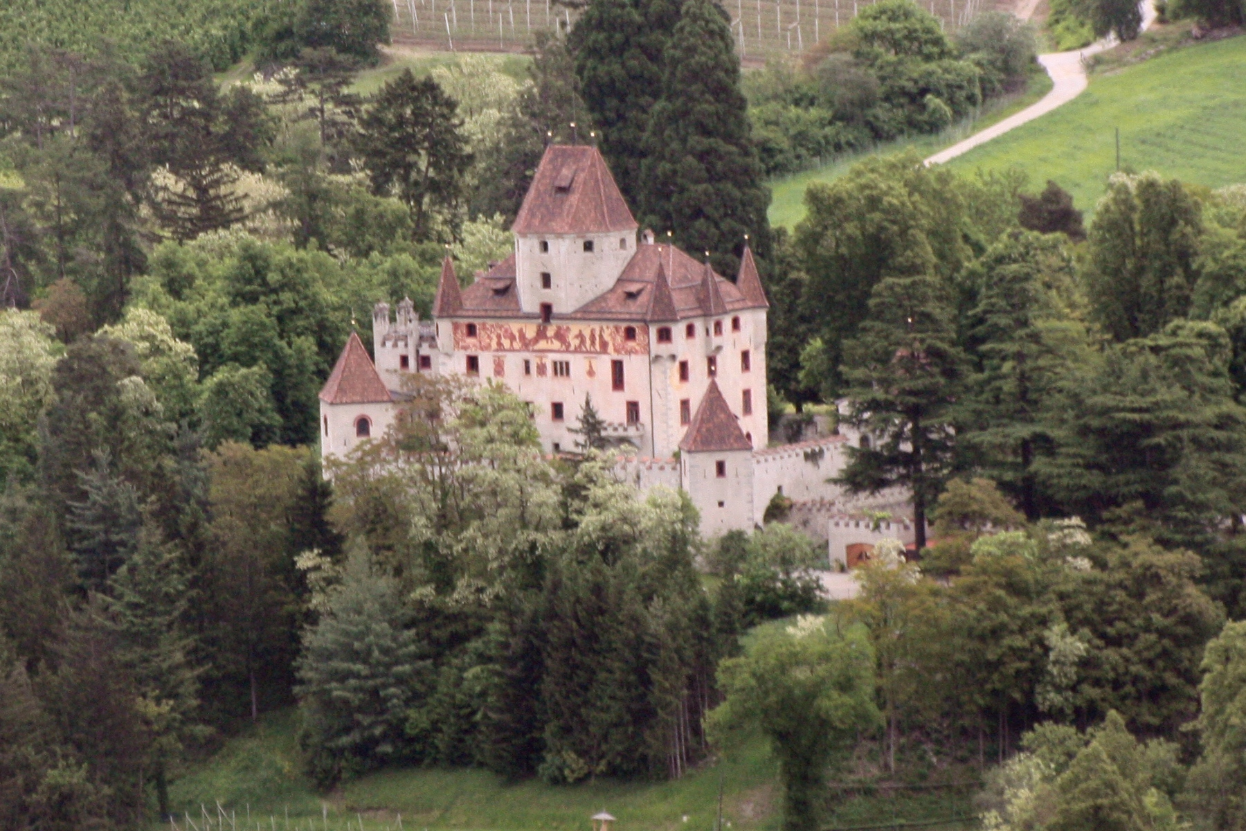 Brixen, Südtirol: Blick auf das Schloss Pallaus bei Sarns